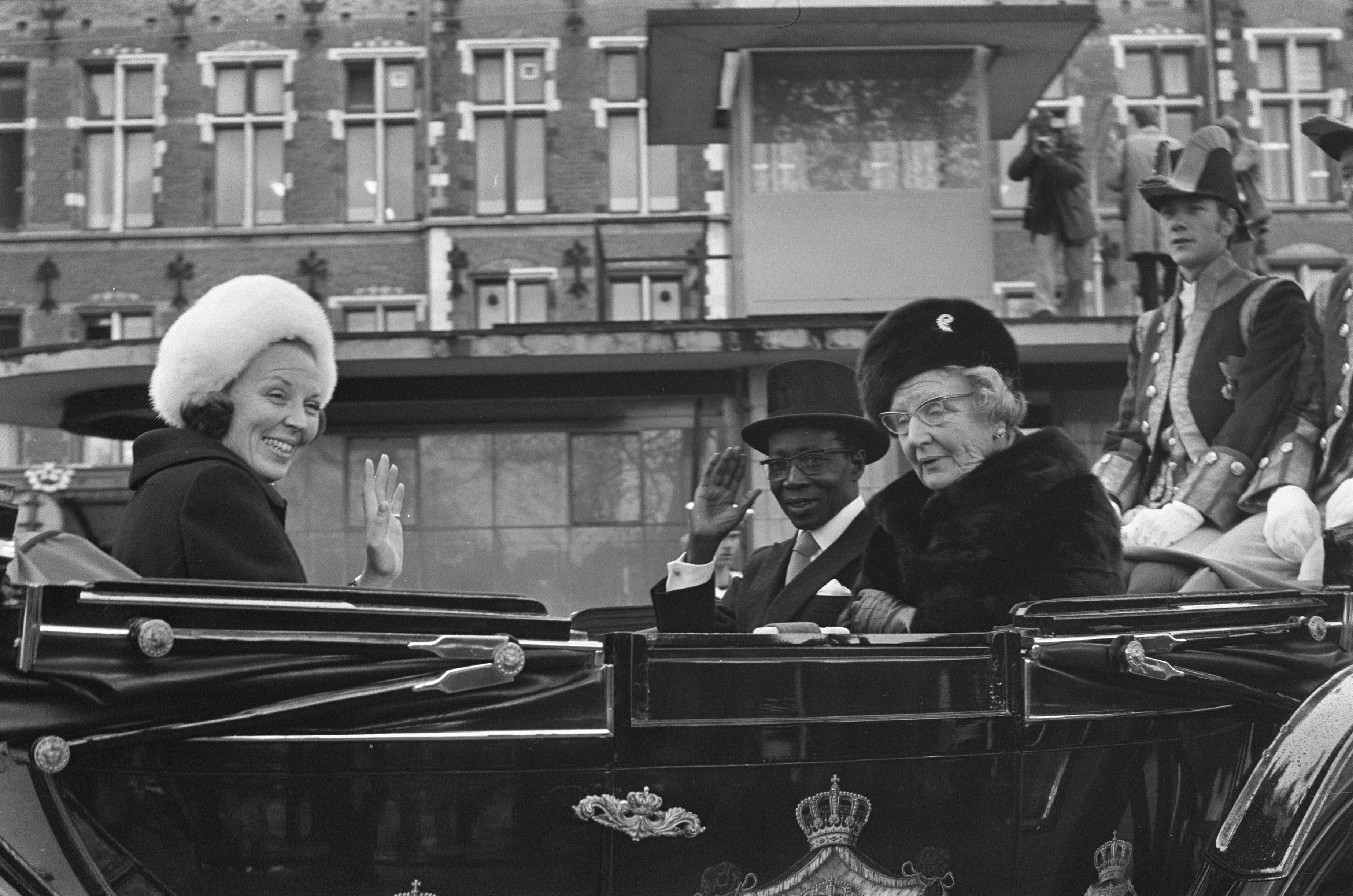 Collectie / Archief : Fotocollectie Anefo Reportage / Serie : [ onbekend ] Beschrijving : Staatsbezoek president Senghor van Senegal aan Nederland aankomst op CS in Amsterdam Datum : 22 oktober 1974 Locatie : Amsterdam, Noord-Holland Trefwoorden : koninginnen, presidenten, rijtuigen, staatsbezoeken Persoonsnaam : Beatrix, prinses, Senghor, Léopold Sédar Fotograaf : Mieremet, Rob / Anefo Auteursrechthebbende : Nationaal Archief Materiaalsoort : Negatief (zwart/wit) Nummer archiefinventaris : bekijk toegang 2.24.01.05 Bestanddeelnummer : 927-5331